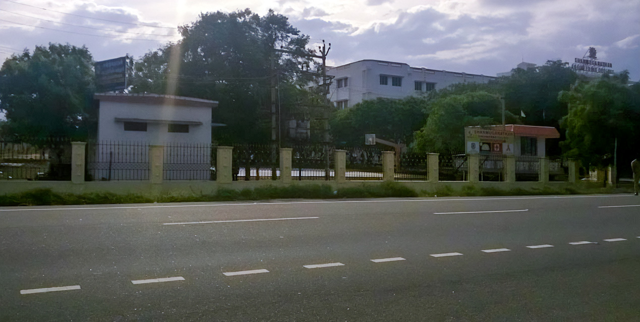 வெளித்தோற்றம்